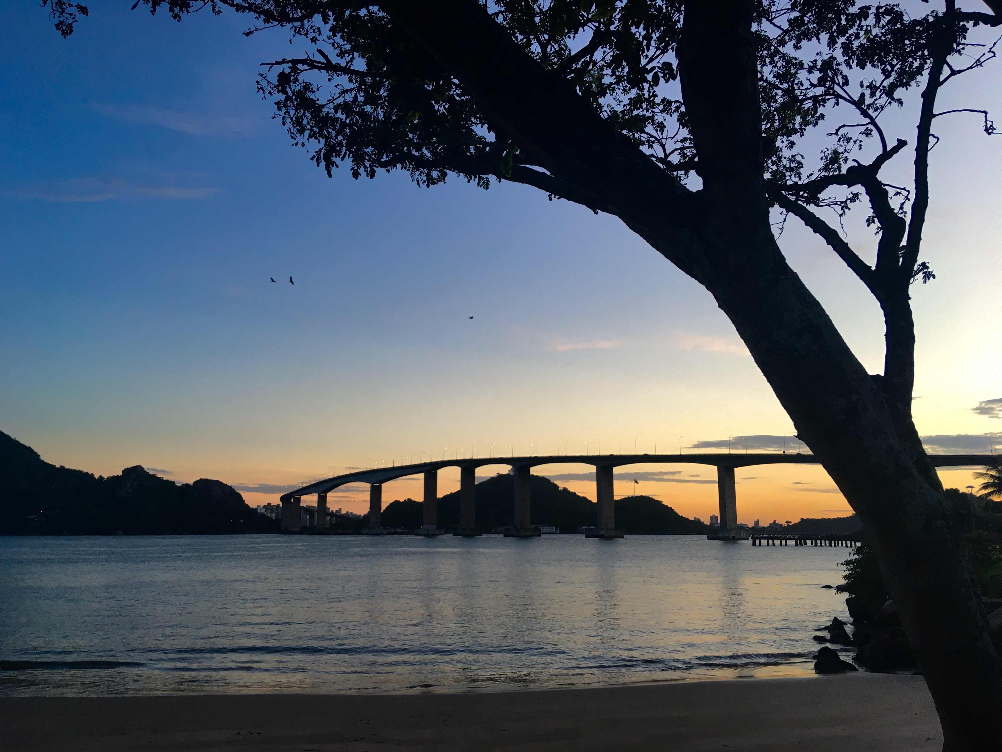 Entardecer na baía de Vitória, cuja observação foi prejudicada pelo Cais das Artes.